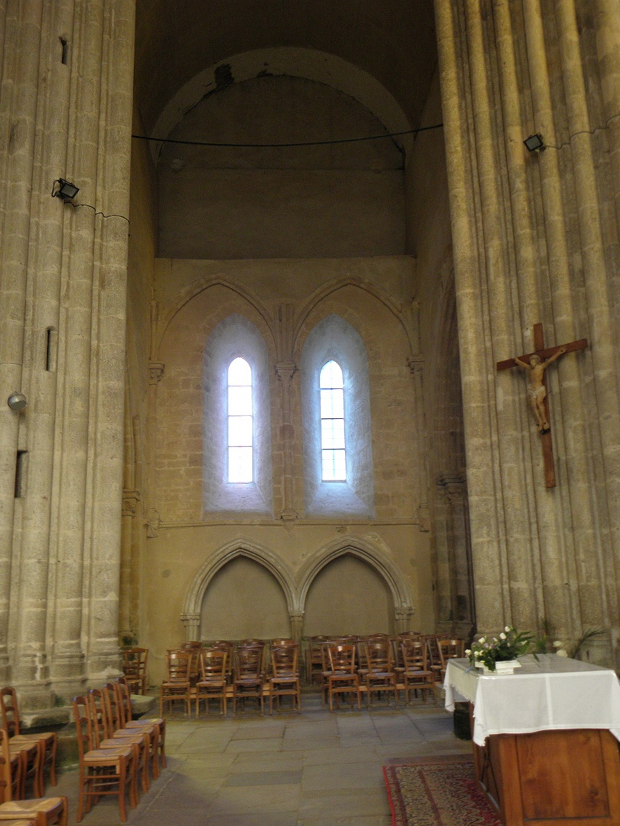 Transept et croisillon nord de la collégiale Notre-Dame-de-Grande-Puissance de Lamballe (22). .